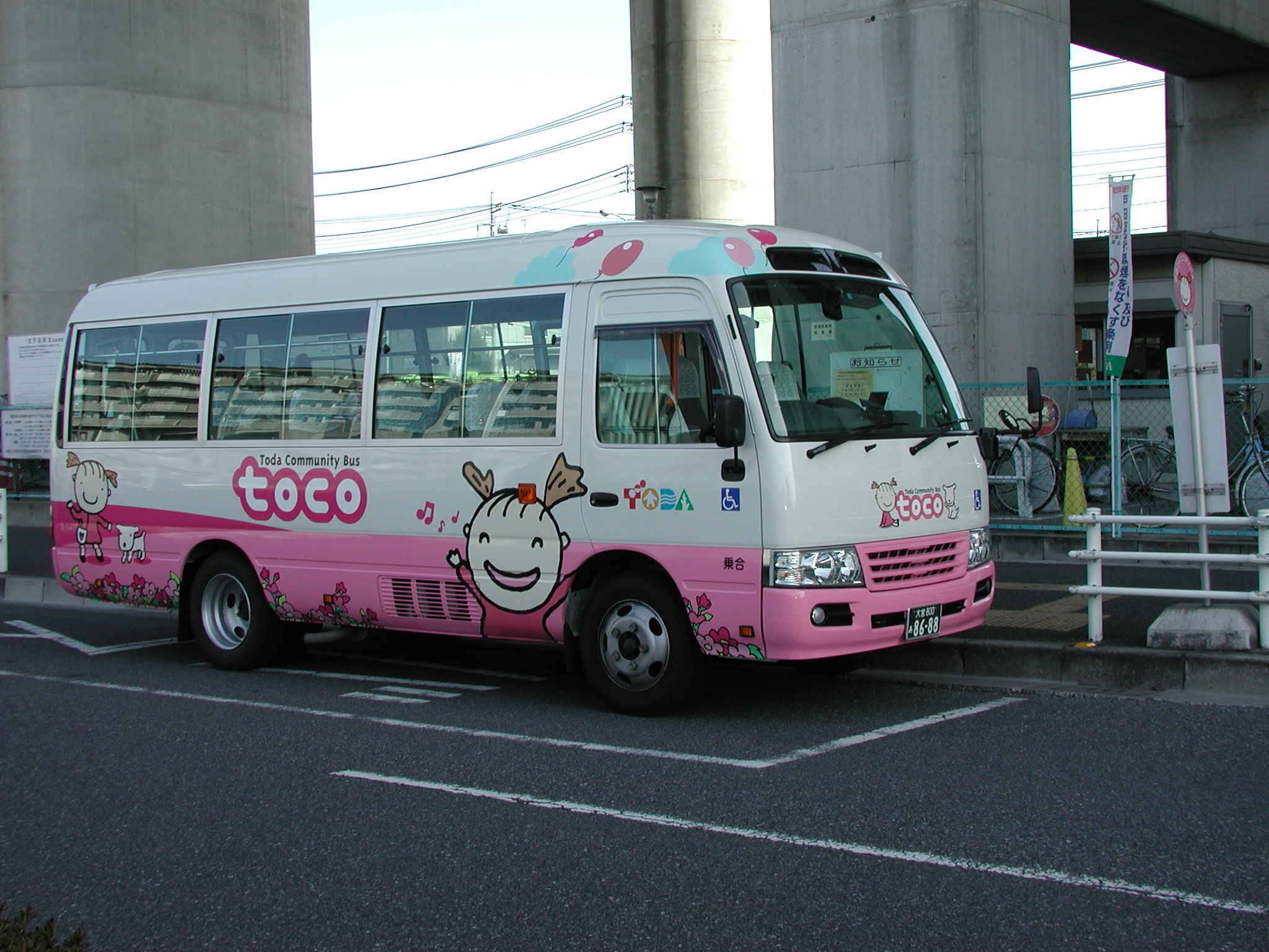 北戸田駅西口にて待機している、「戸田市コミュニティバス『toco』」美笹循環「花の公園（2代目）」 （トヨタ・コースターウェルキャブ 標準LX=タイプIII(BDG-XZB40-VTPENT )/埼京タクシー所属）